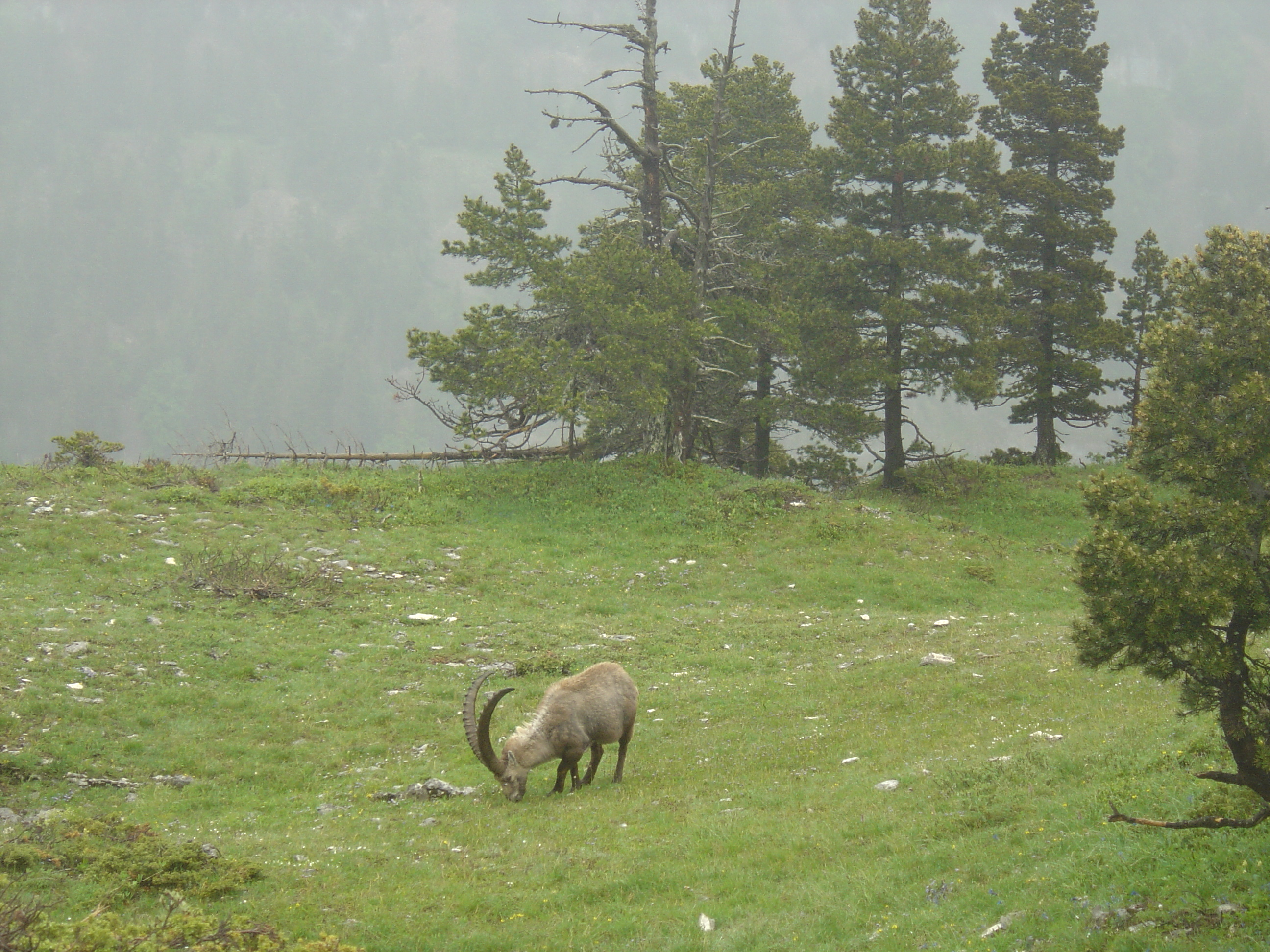 Bouquetin entre la plaine du Roi et la montagne de la Glandasse (cirque d'Archiane dans le Vercors) vers 1625m d'altitude